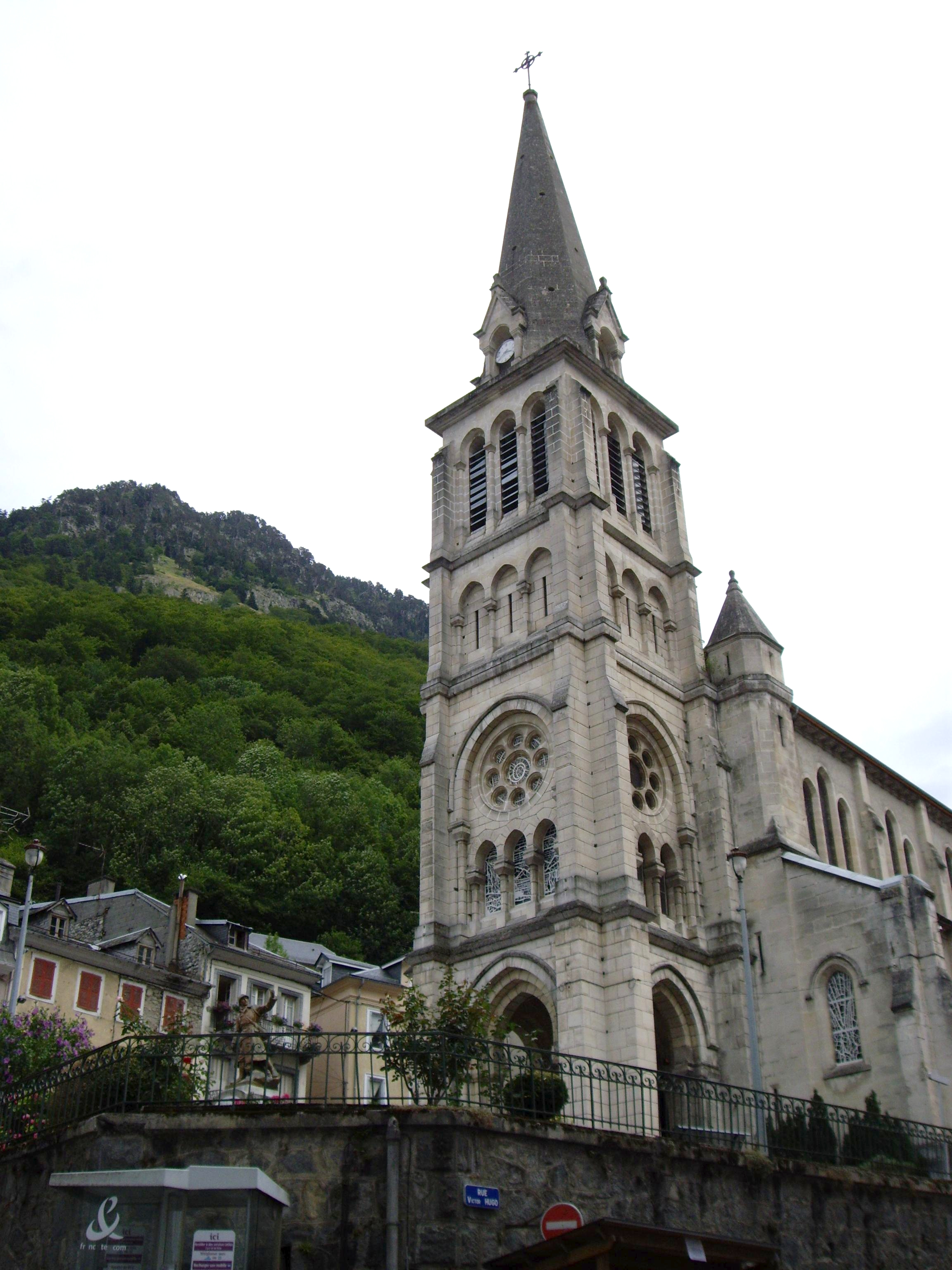 Église Notre-Dame de Cauterets (65)